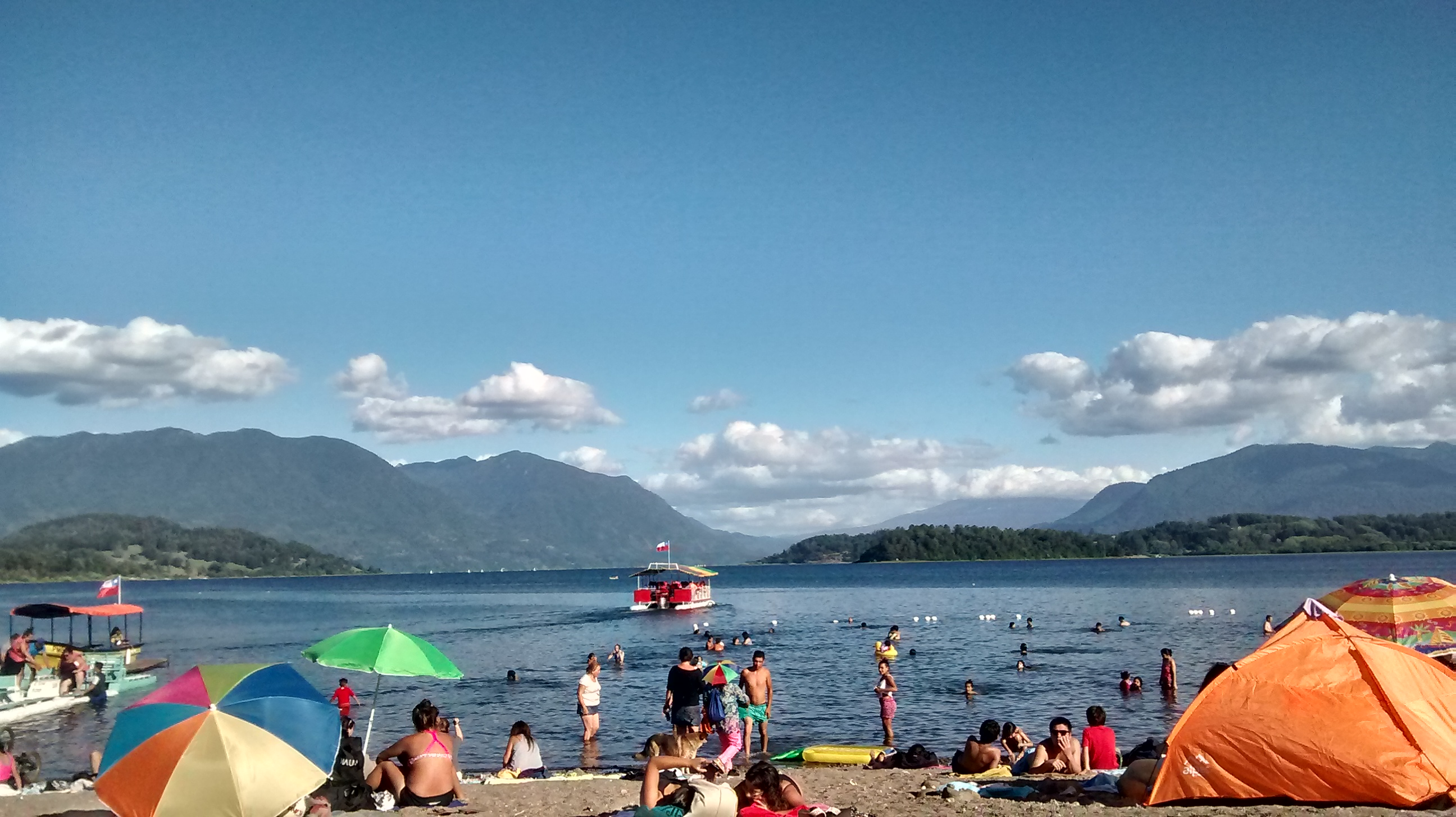 lago panguipulli, balneario en la comuna de panguipulli